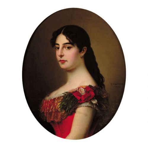 La Reina Natalija de Serbia.